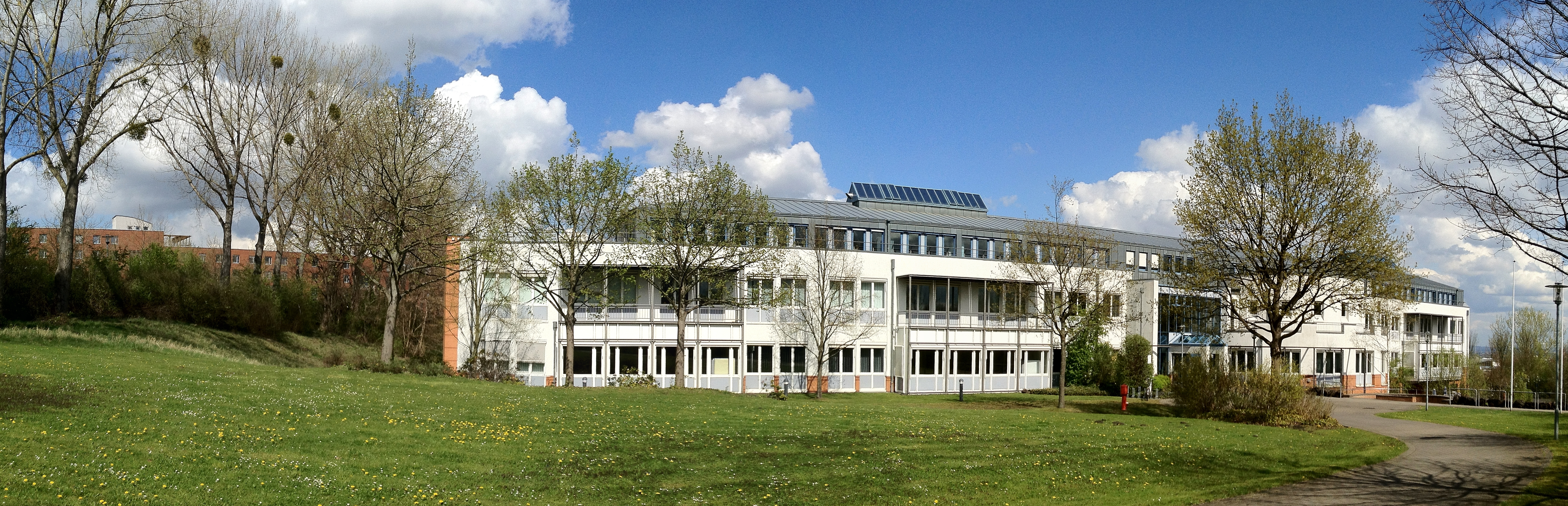 Panorama des Seminargebäudes der Bundesfinanzakademie in Brühl, Foto: Bernhard Münch